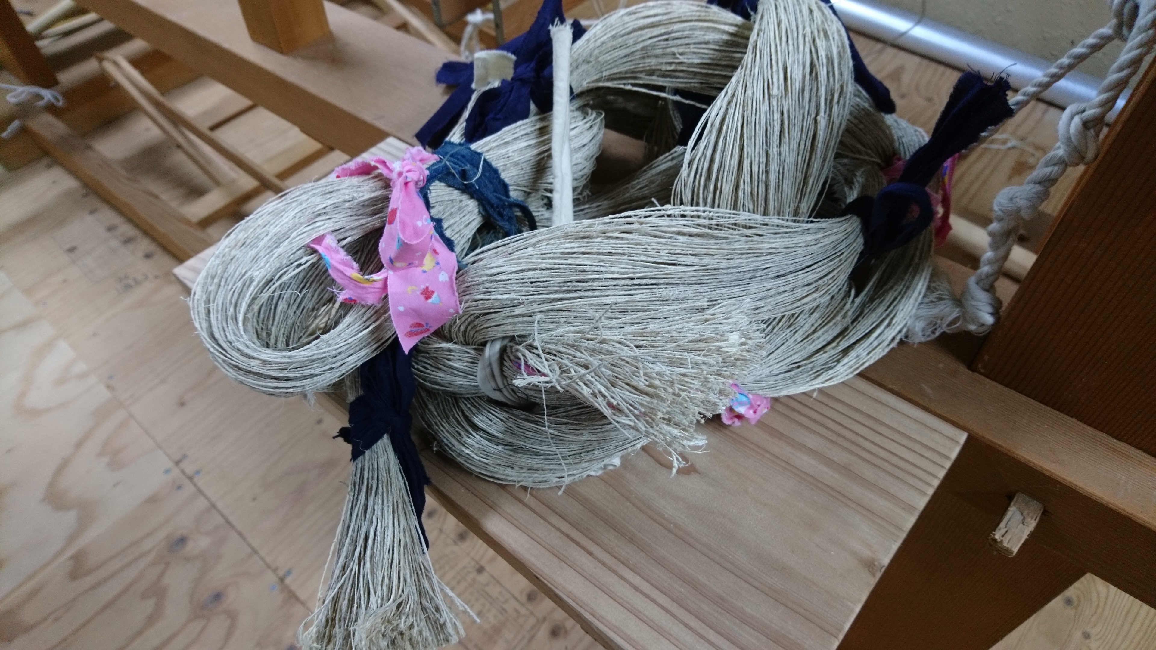 整経（ヘバタ）後、枠から外された藤織りの経糸。